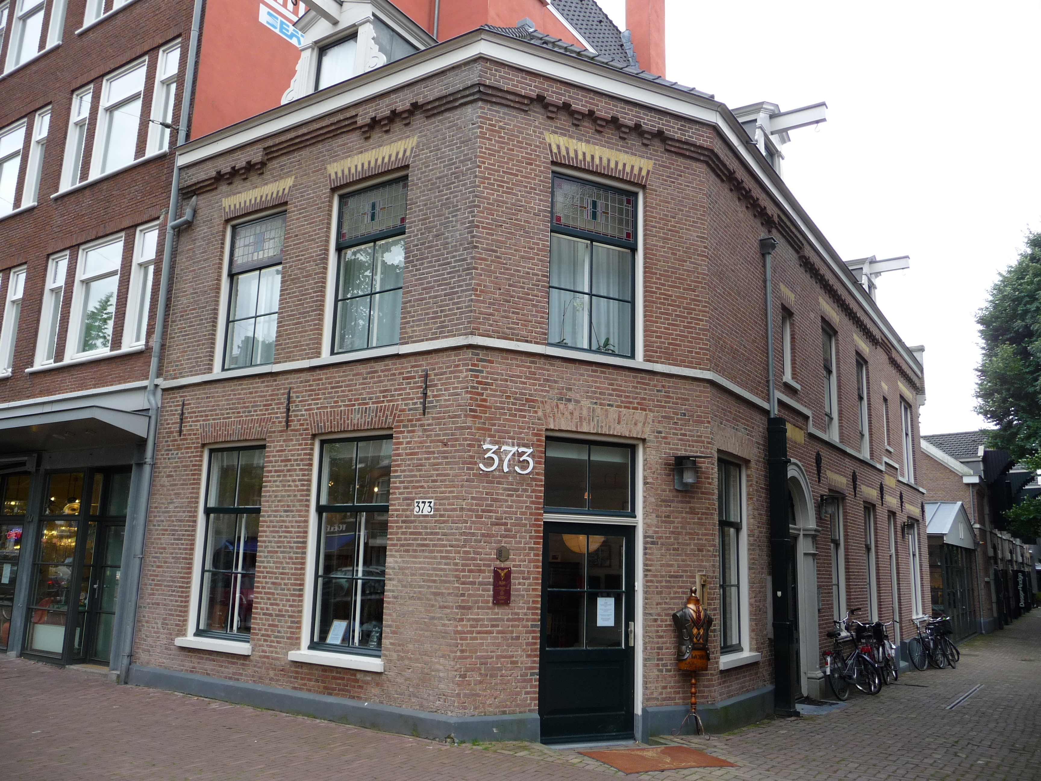 Rijksmonument Overtoom 373, Amsterdam